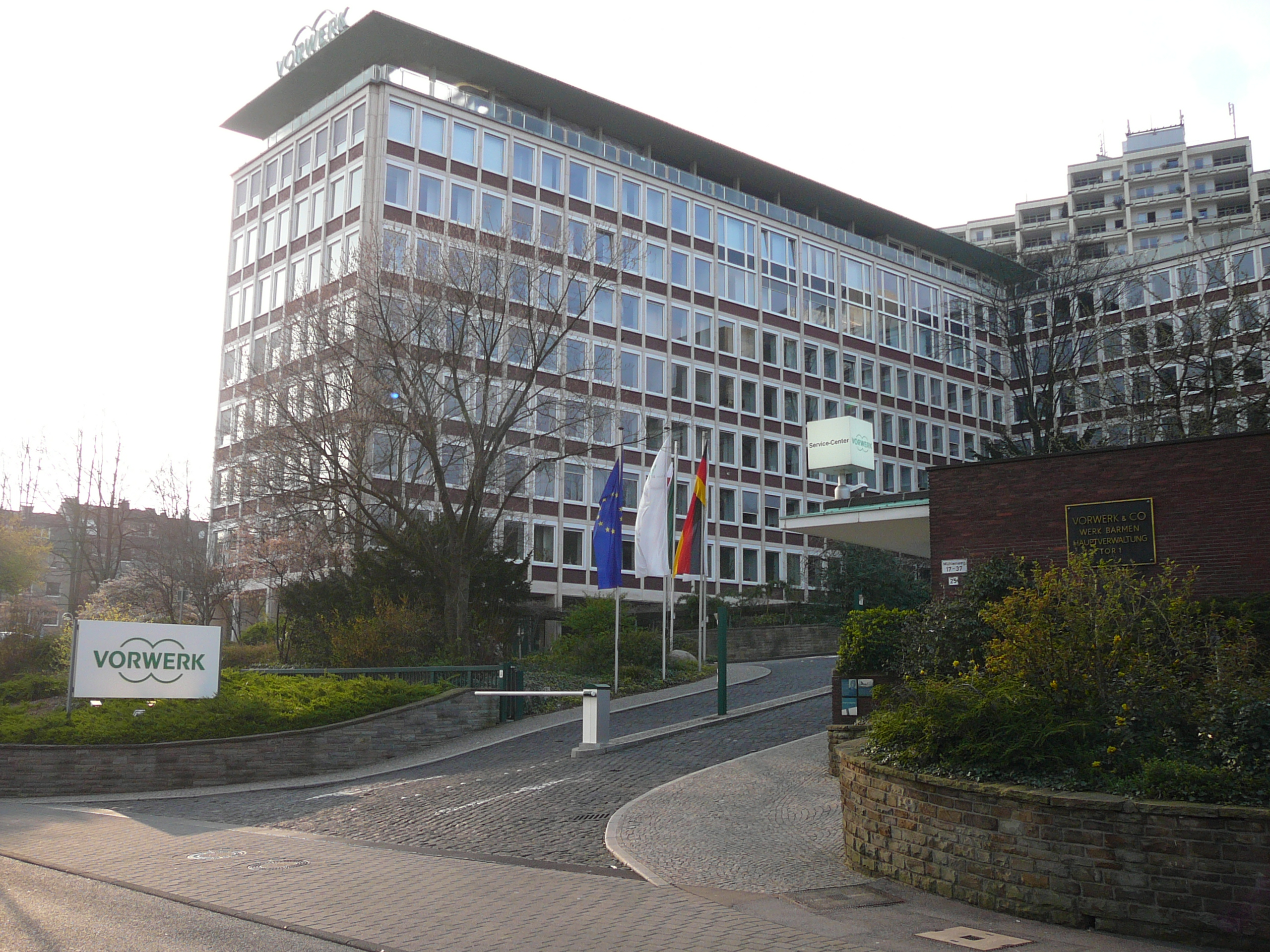 Mühlenweg, Wuppertal-Barmen